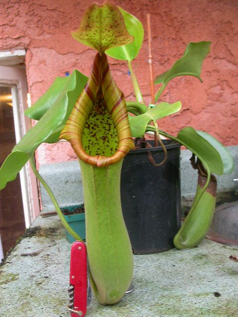 Cultivated N. truncata.